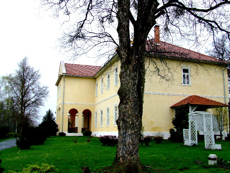 Fábiánics-kastély, Misefa